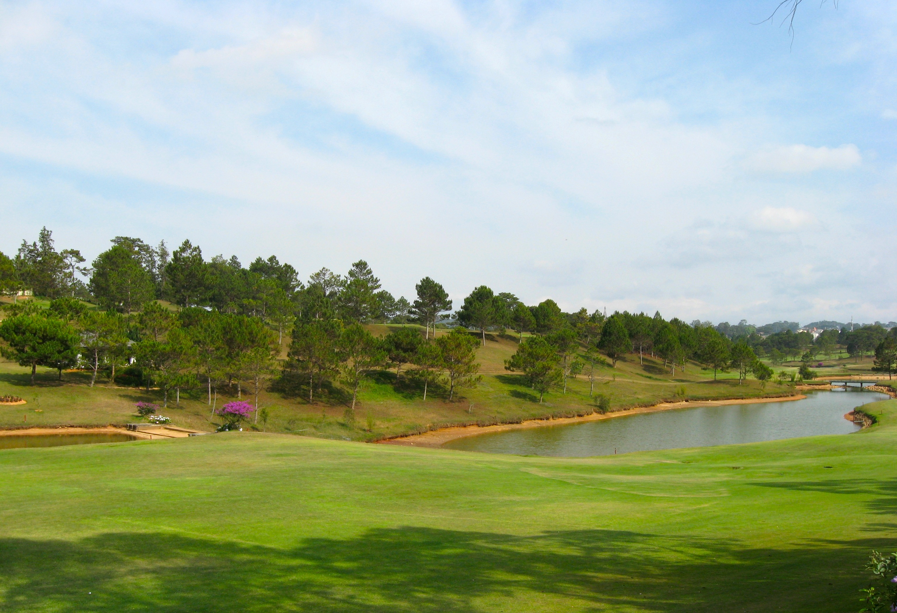 Đồi Cù